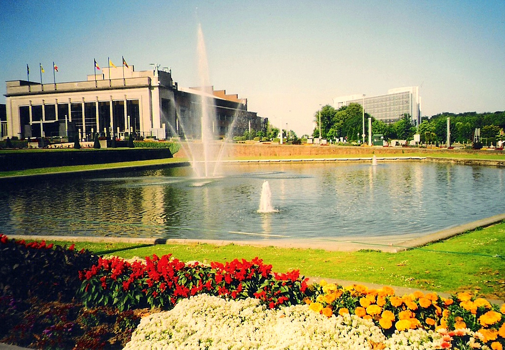 BRUXELLES - Palau del Centenari. Edificat amb motiu de l´Exposició Internacional de 1935